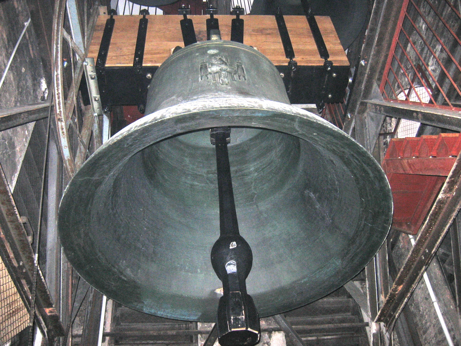 Jubiläumsglocke des Alten Peters zu München